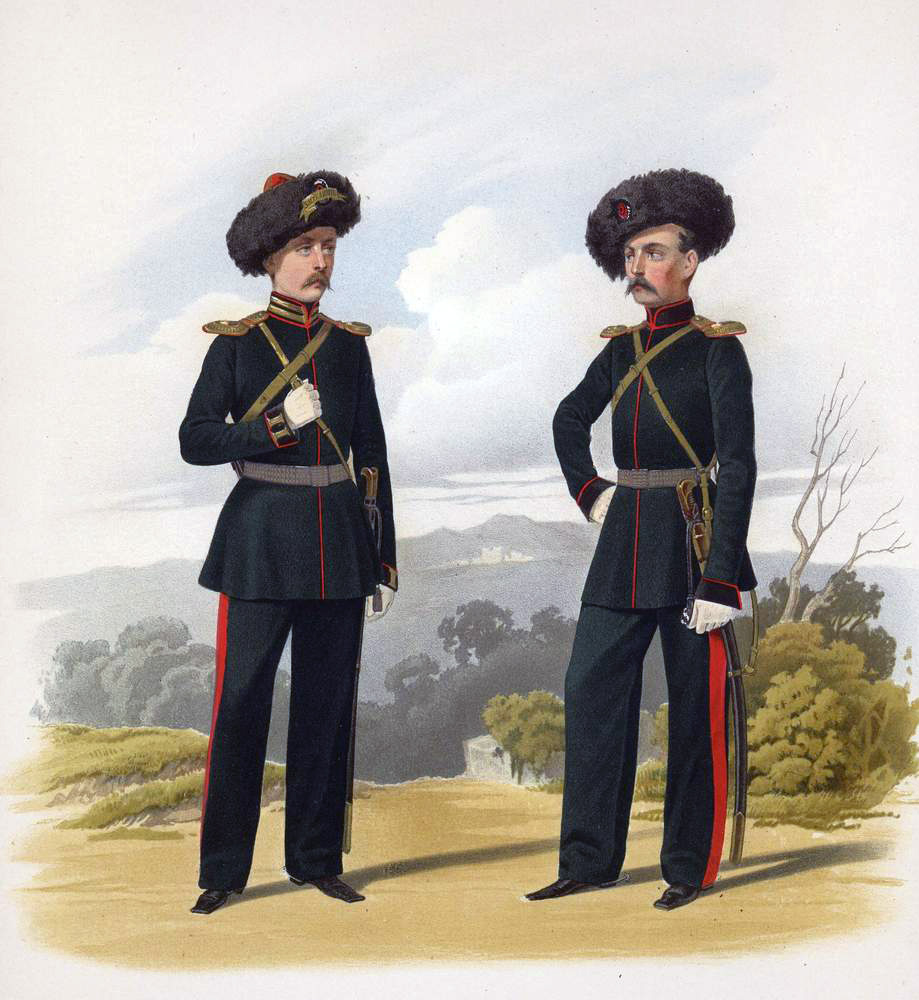 Обер-Офицеры Донских Казачьих Конно-Артеллерийских батарей №№ 2-го и 4-го, 18 марта 1855. (В парадной форме).